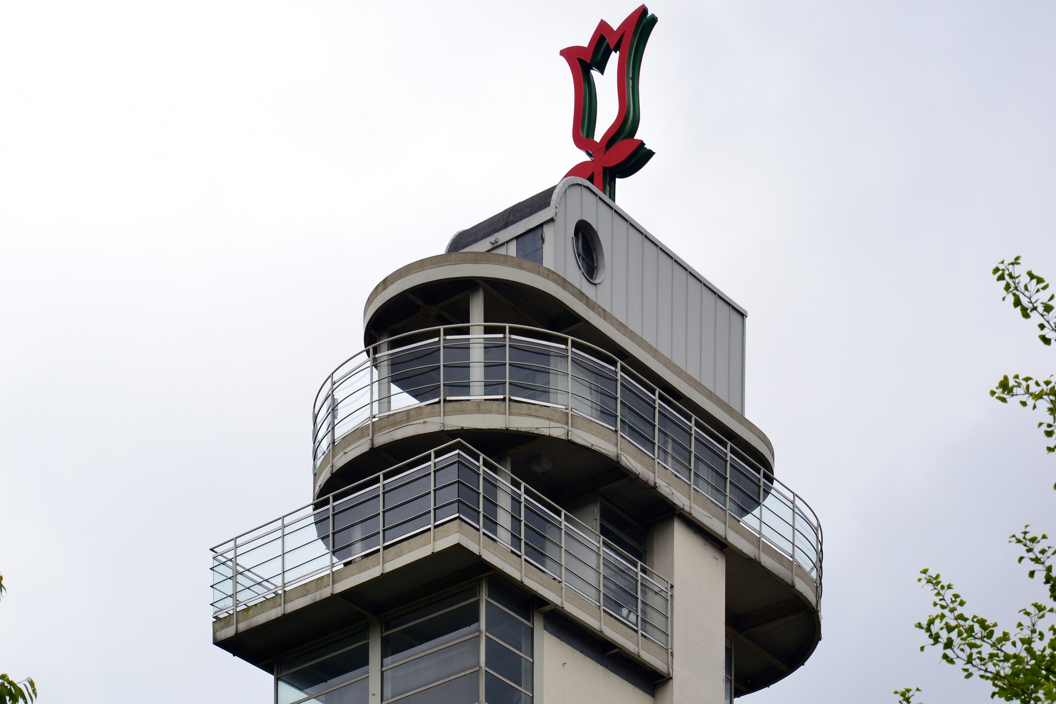 Aussichtsturm im Grugapark in Essen, unter Denkmalschutz